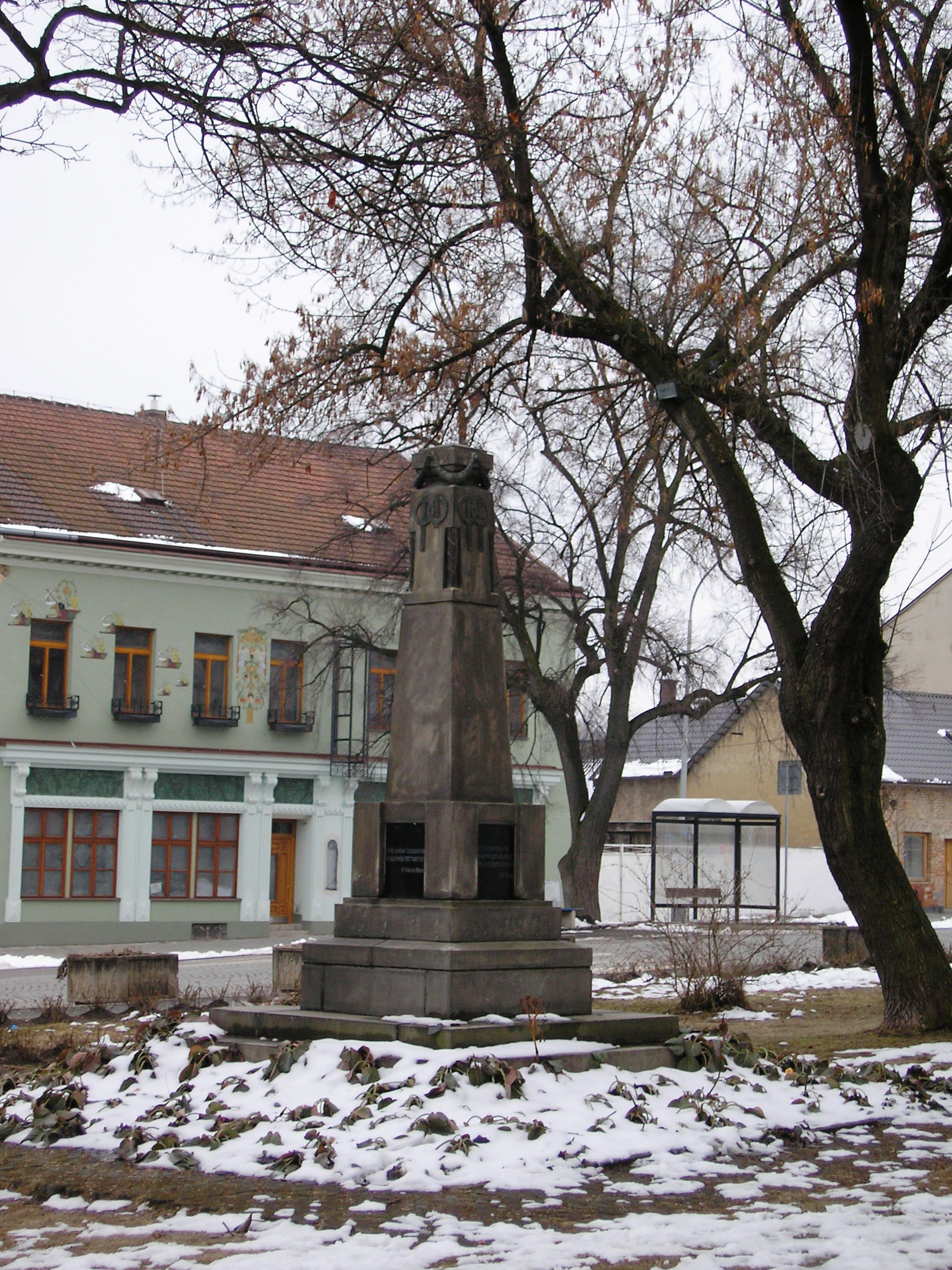 Pomník padlým v 1.sv.v., Úvaly